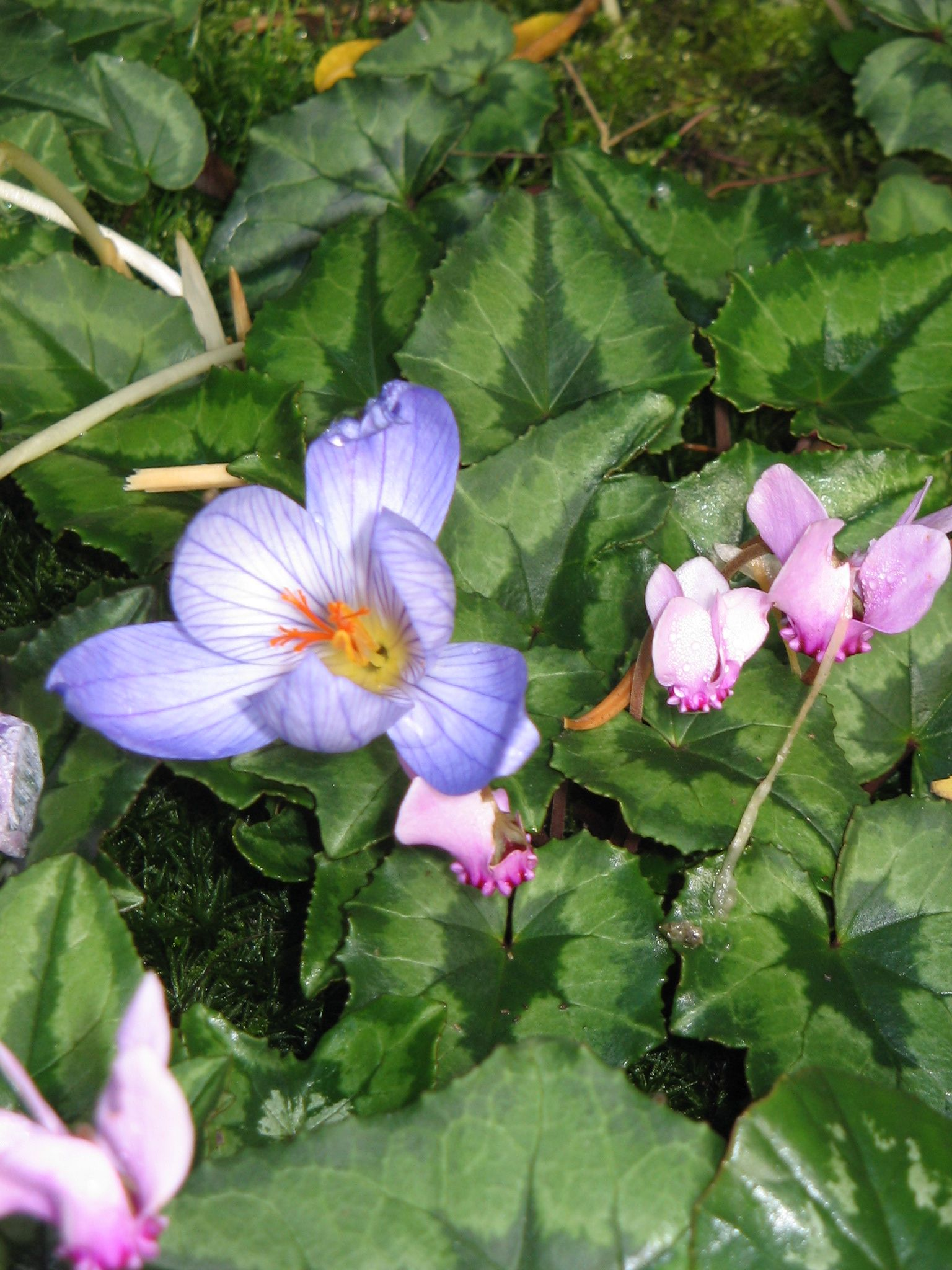 Crocus speciosus 'Artabir' photographié dans mon jardin